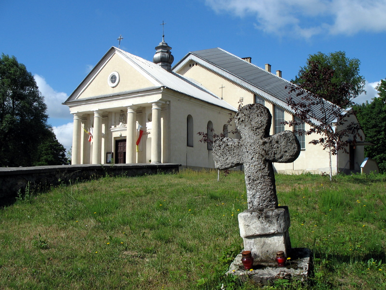 Horyniec-Zdrój (Poland), church